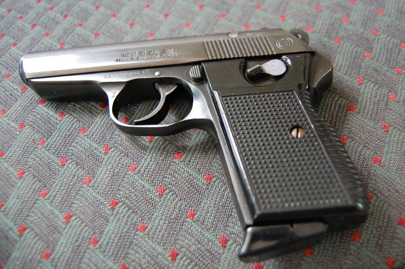 Pistol vzor 70